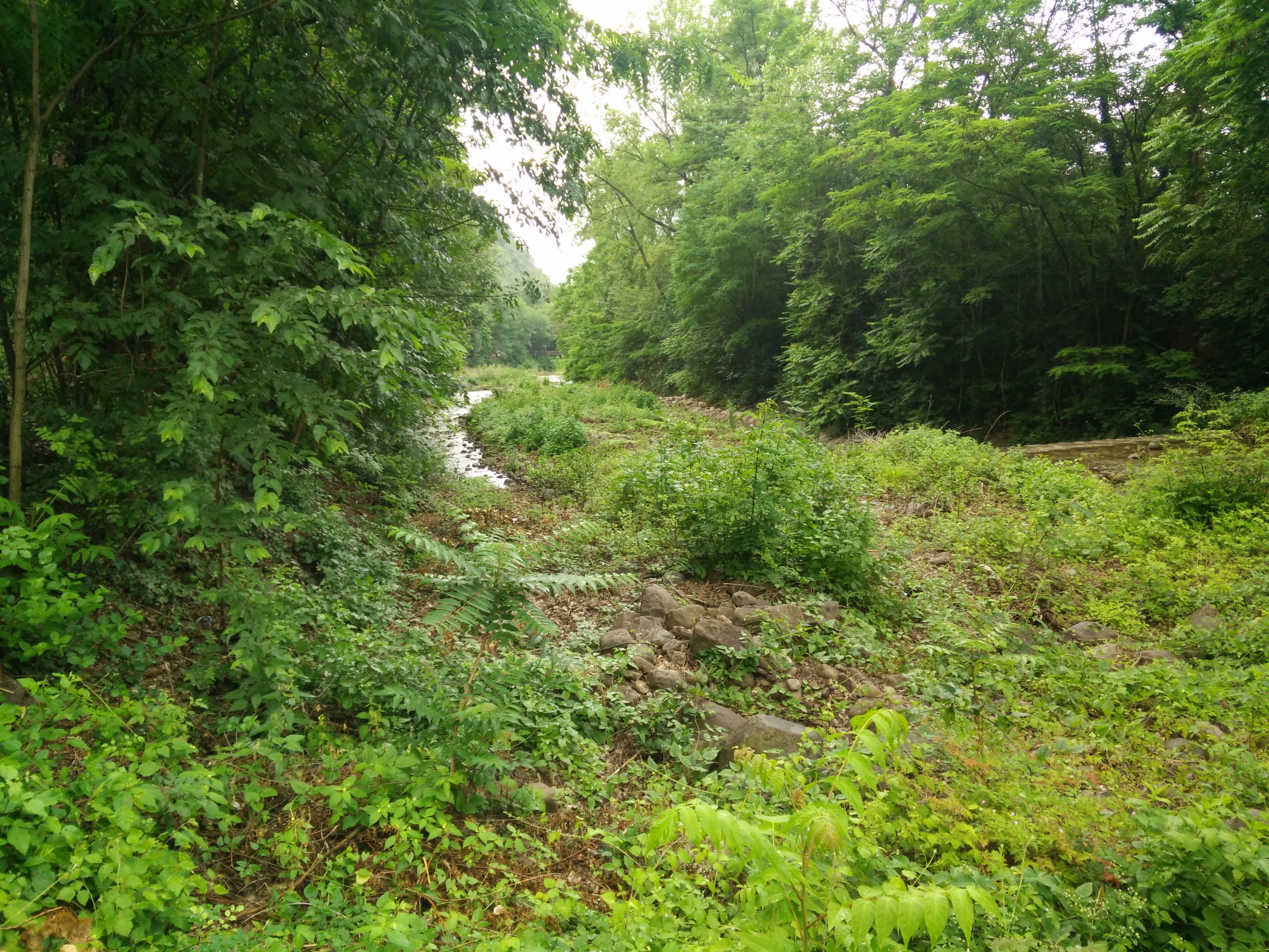 Il Rio Vallarsa nell'abitato di Laives, Italia